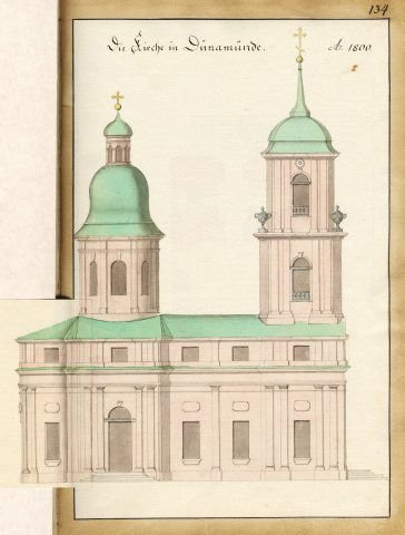 Scan from Johann Christoph Brotze's book Sammlung verschiedner Liefländischer Monumente. Die Kirche in Dünamünde. Anno 1800 [die Ansicht]. (Daugavgrīva)